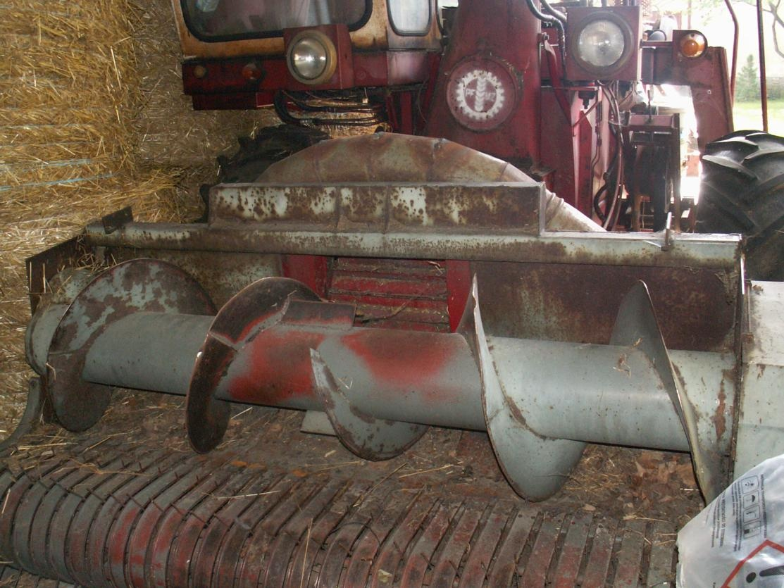 Sieczkarnia Orkan Z340 z przyrządem podbierającym Z342